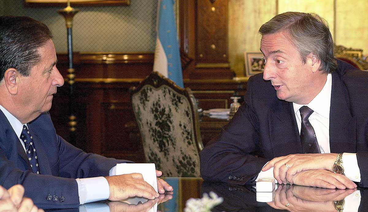 Casa Rosada, Despacho Presidencial - El presidente Néstor Kirchner recibe al ex-presidente de la Nación, Eduardo Duhalde.